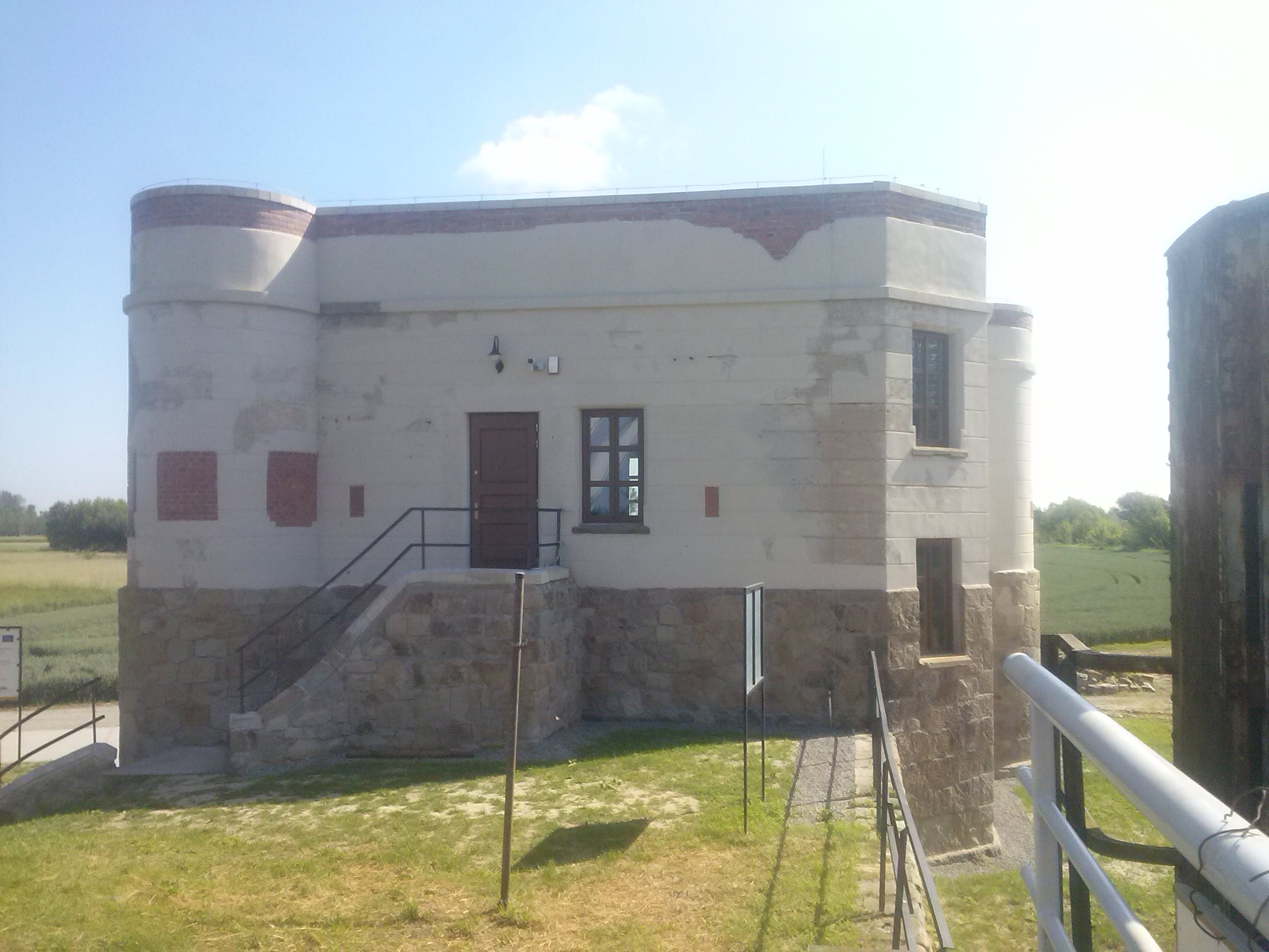 Strażnica kolejowa w Chodaczowie z 1905 roku - od 2016 własność Gminy Tryńcza, widok obecny od czerwca 2019, po remoncie